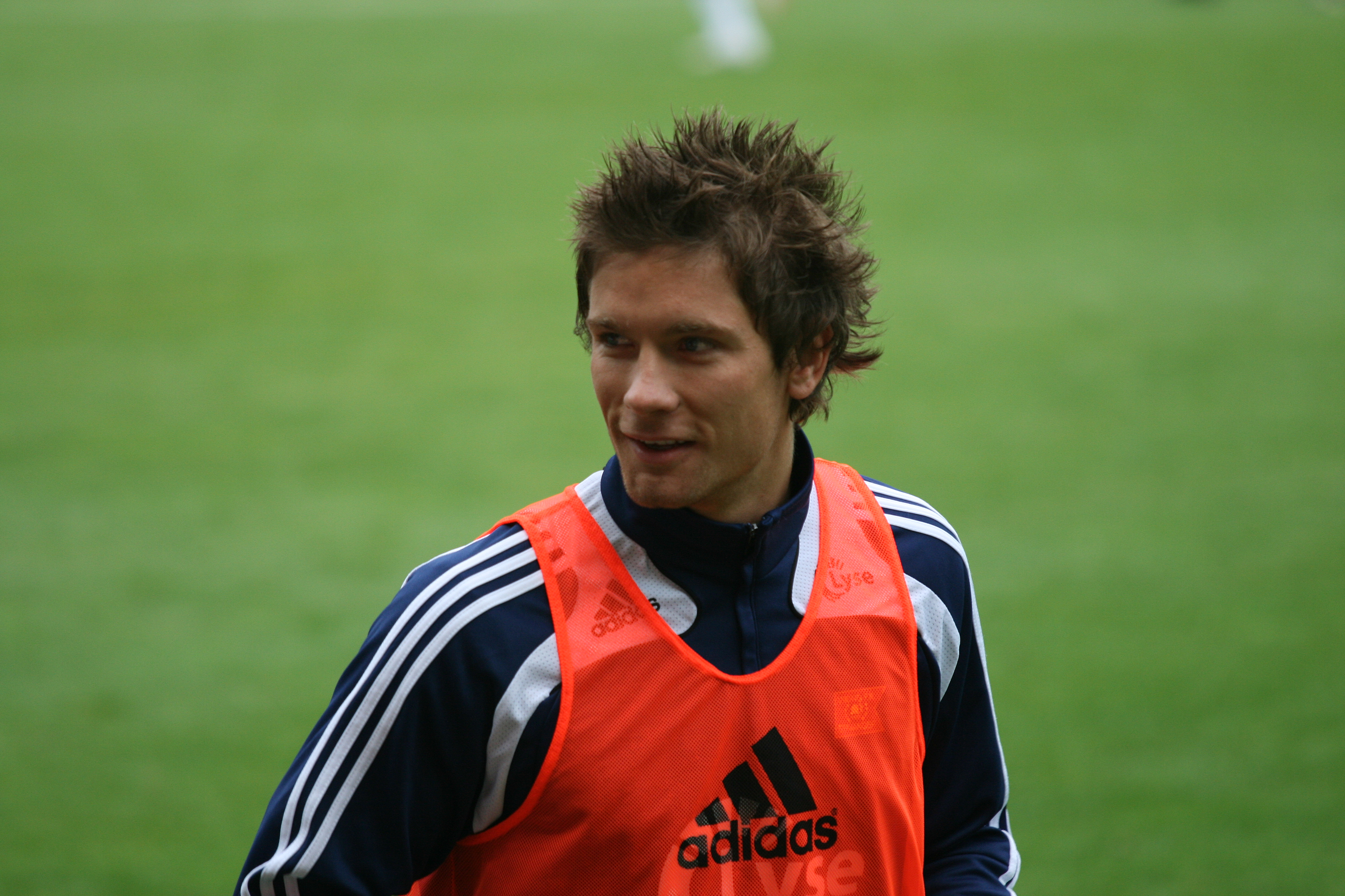 Martin Fillo, på Viking stadion 24. august 2008